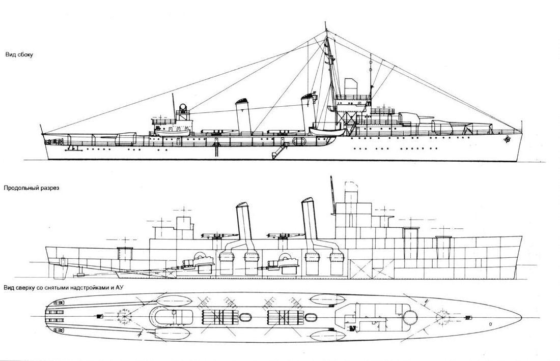 «Эсминец для СССР» (проект 10921). Проект выполнен фирмой Gibbs and Cox.